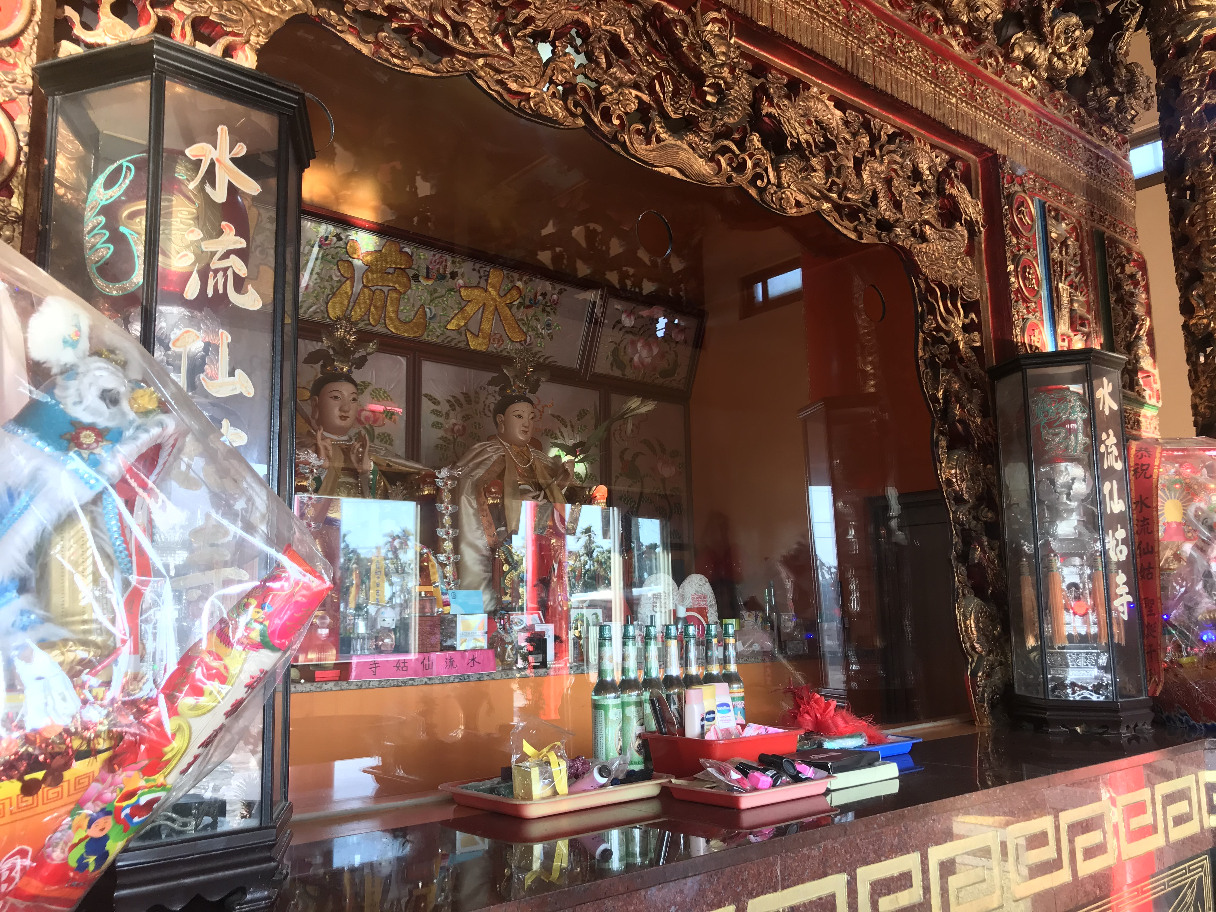 水流仙姑寺神像